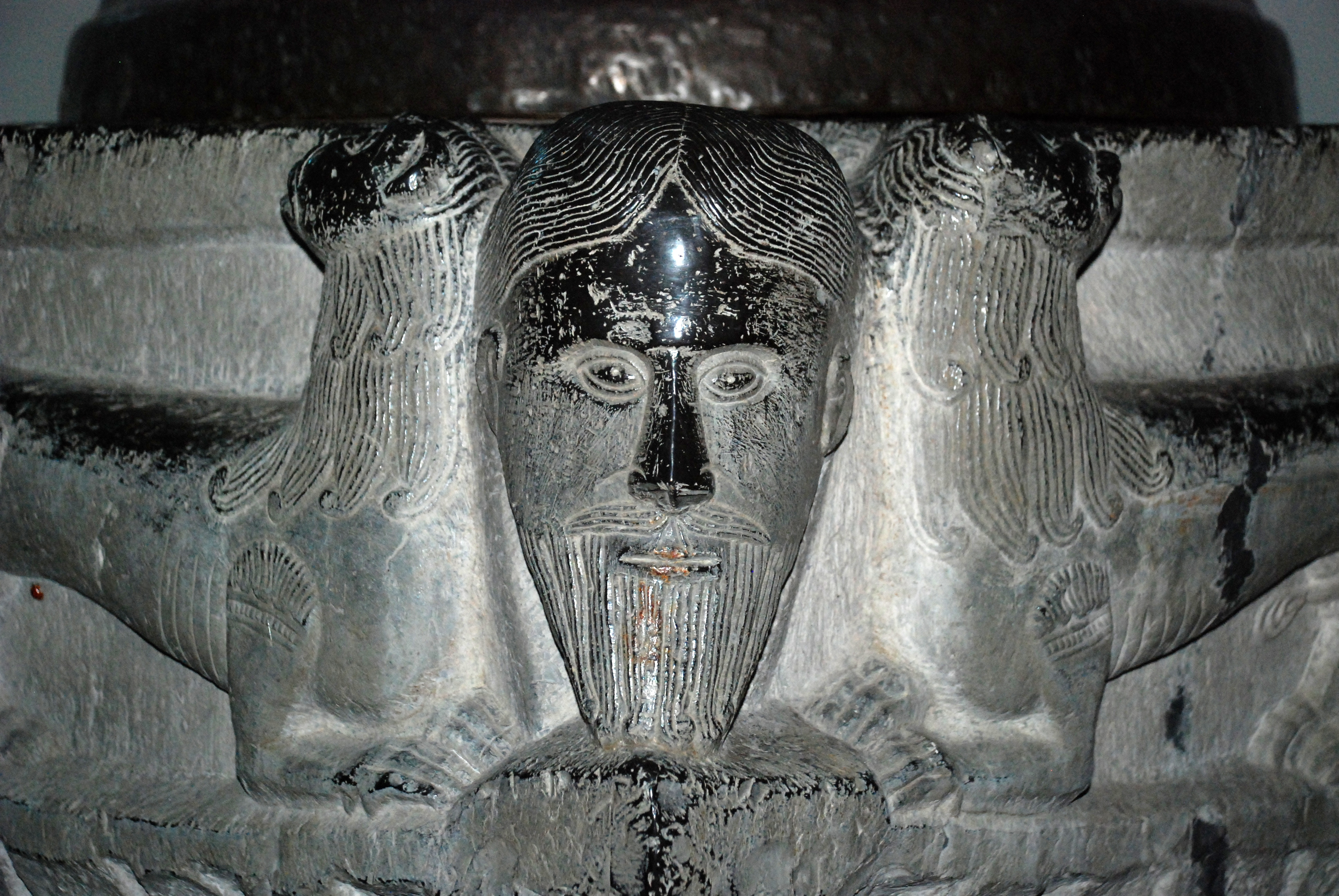 Belgique - Wallonie - Fonts baptismaux de Saint-Séverin-en-Condroz